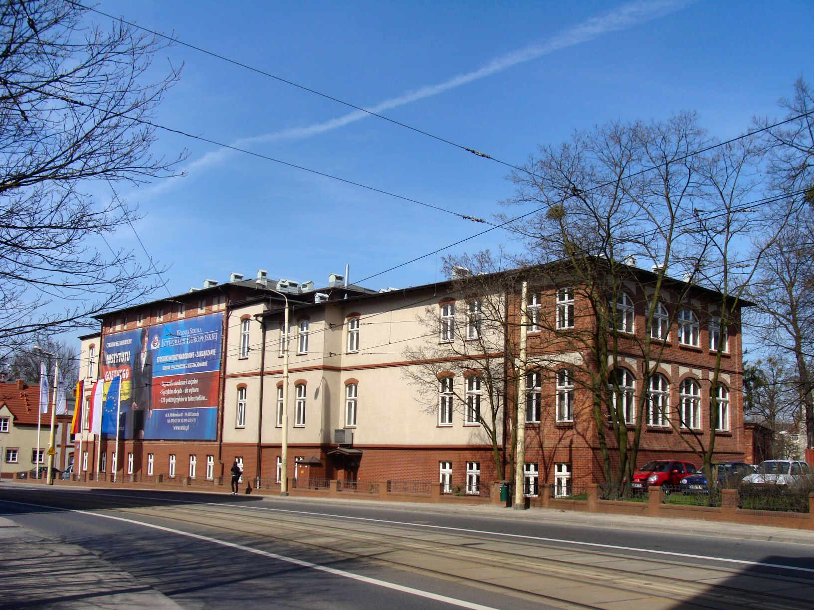 Budynek nowego oddziału kobiecego zakładu opiekuńczego "Bethanien", obecnie Wyższa Szkoła Integracji Europejskiej przy ul. Mickiewicza 47 w Szczecinie